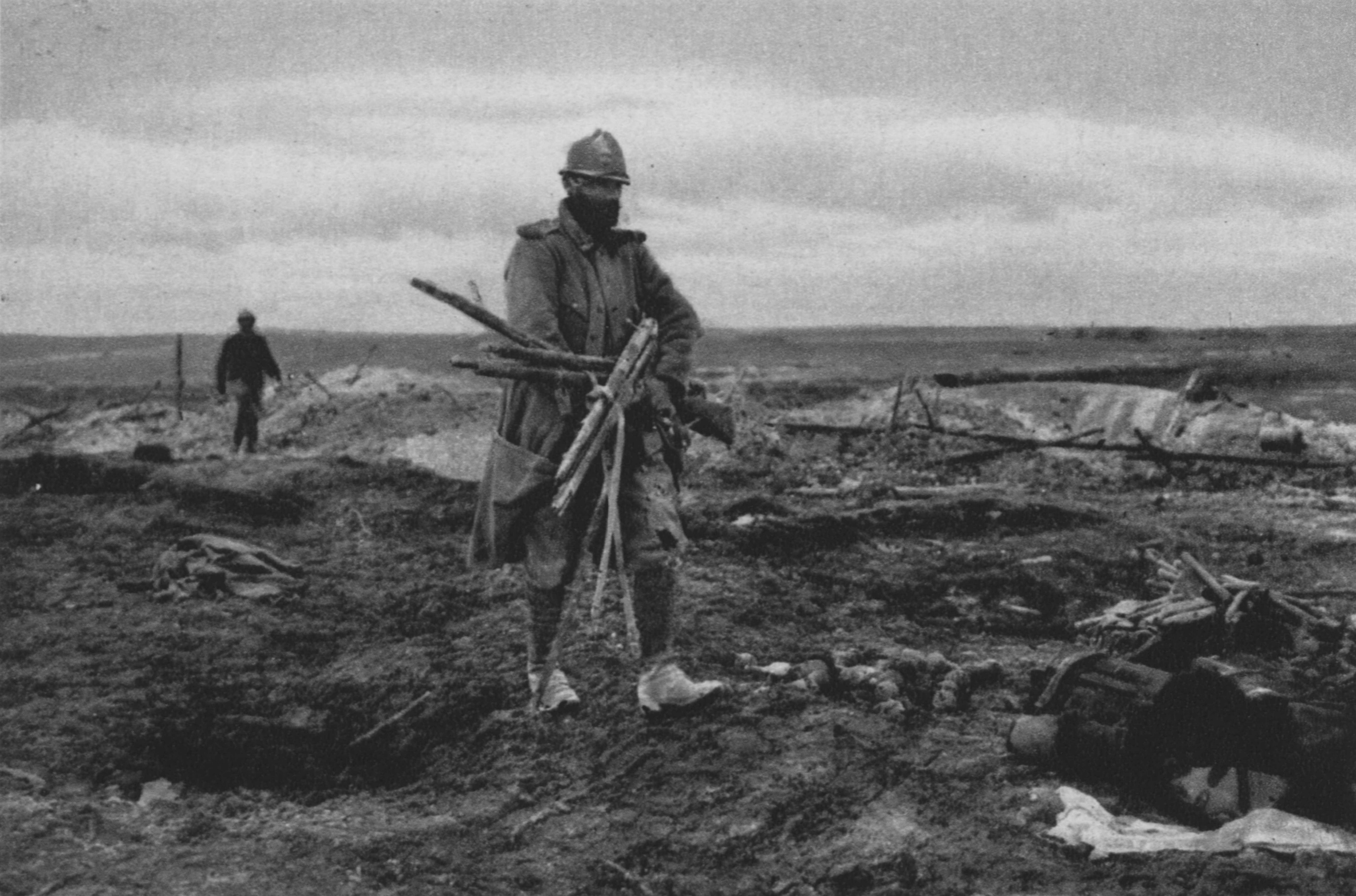 Sammeln von Beutestüncken in den von den Deutschen verlassenen Gräben bei Perthes in der Champagne (1. Oktober 1915).